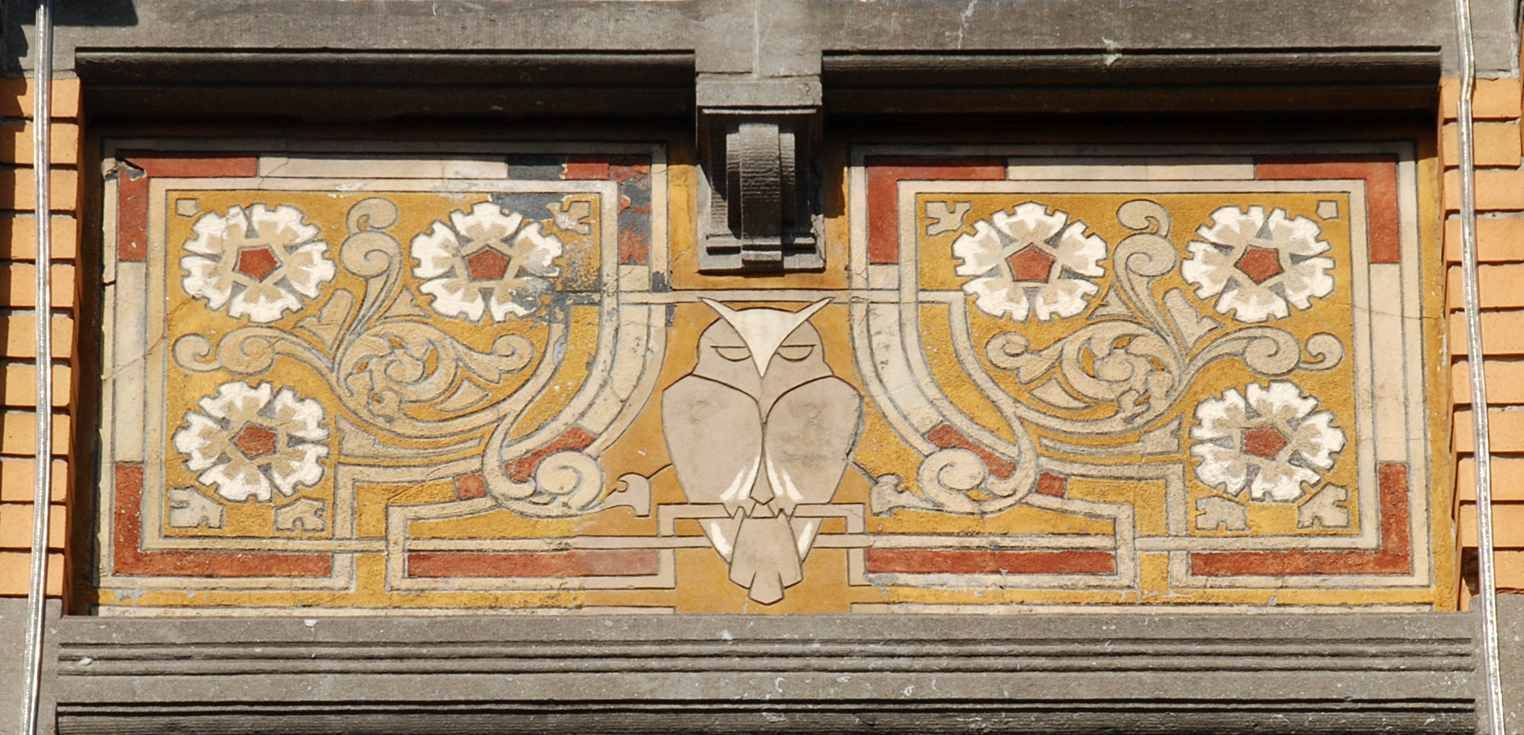 Belgique - Bruxelles - Ancienne école communale des filles de Koekelberg (Art nouveau - architecte Henri Jacobs)